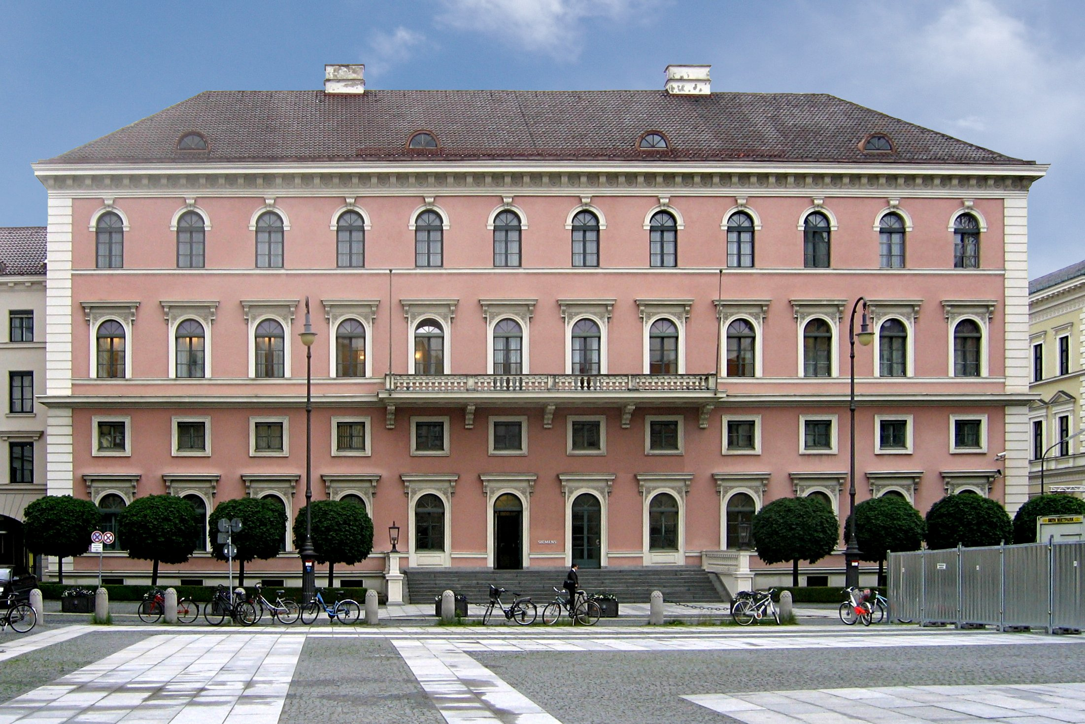 Zentrale der SIEMENS AG am Wittelsbacherplatz